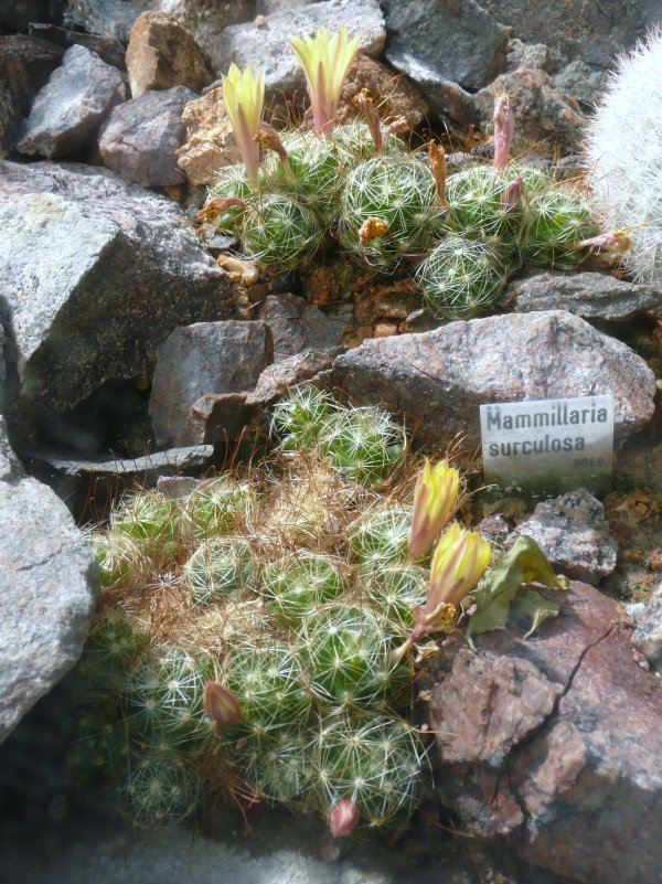 Botanischer Garten Erlangen, 2008